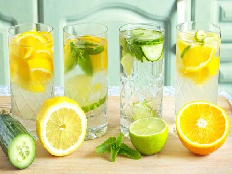 Penyajian infused water di dalam gelas kaca